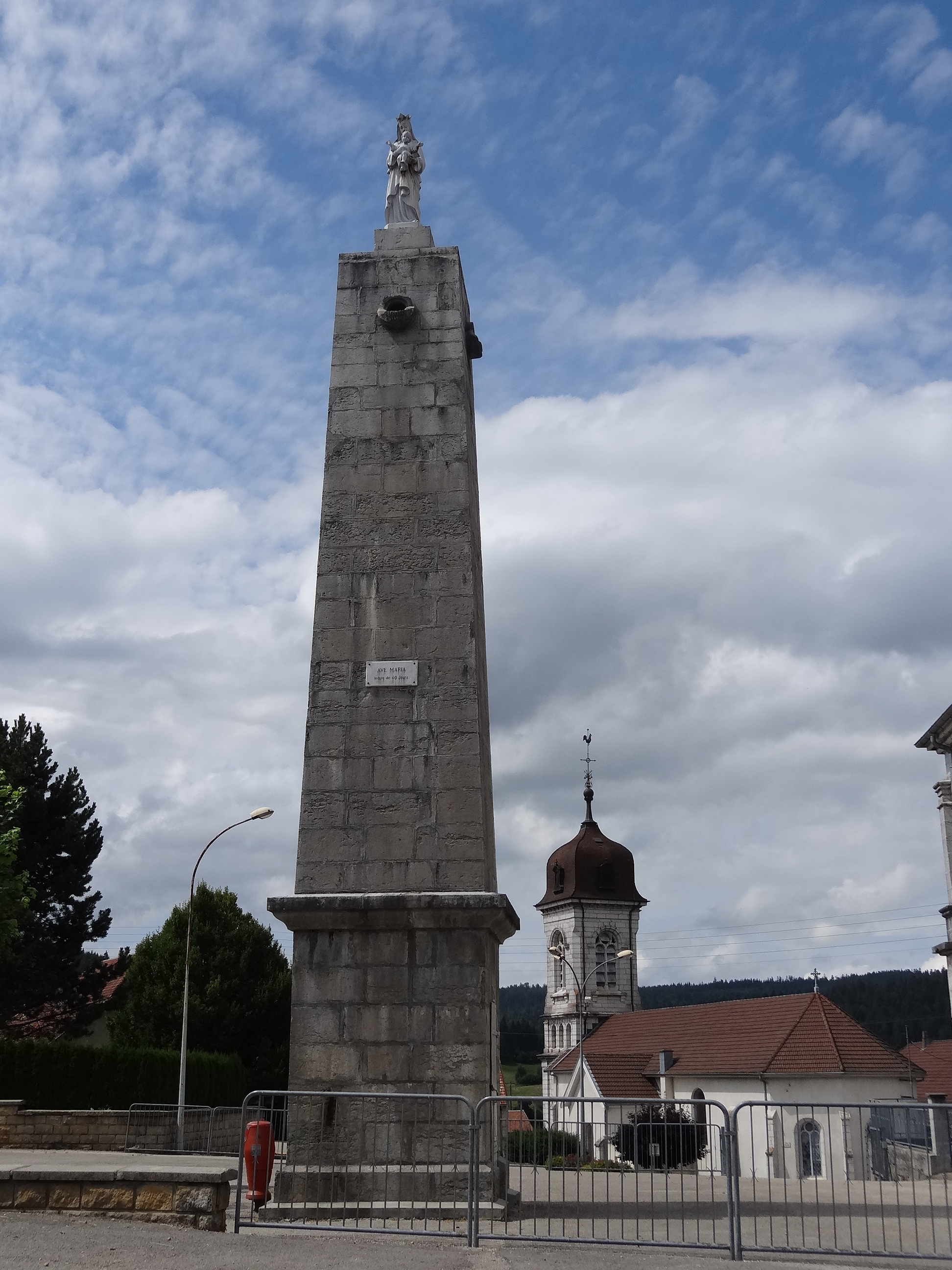 Vaux-et-Chantegrue (Doubs) - Château d'eau dénommé "la Pyramide"